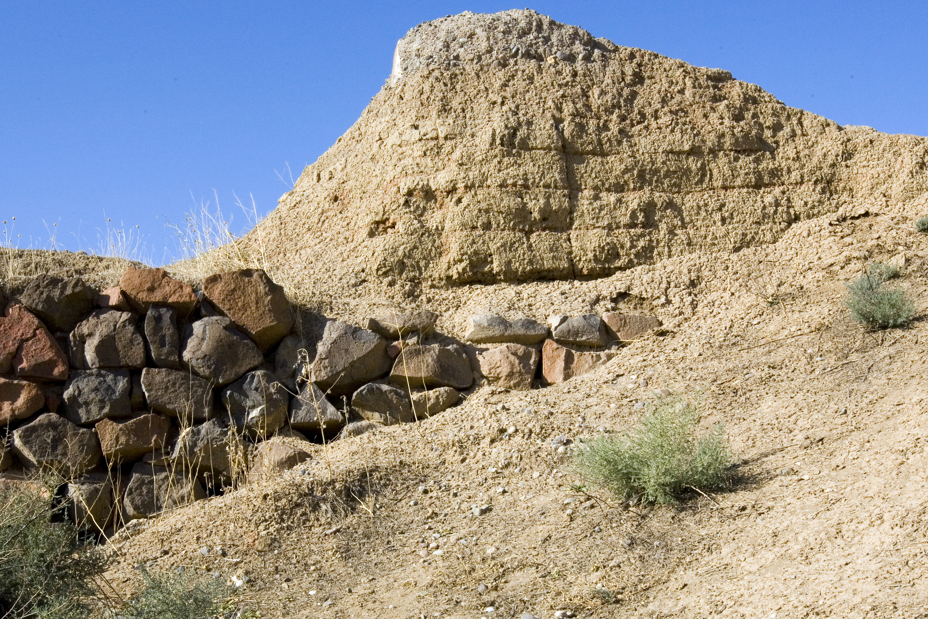 Erebuni, Wall structure